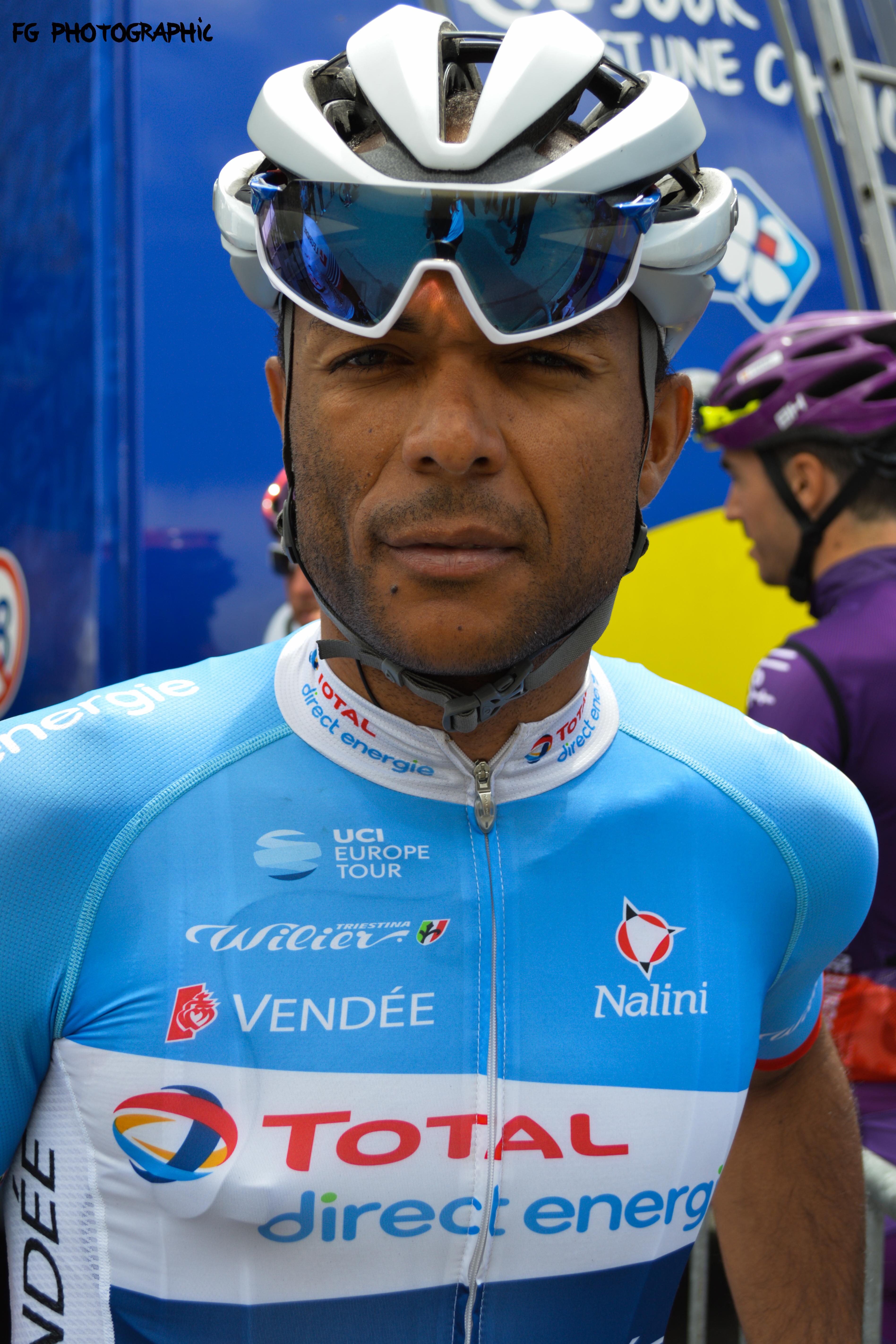 Portrait